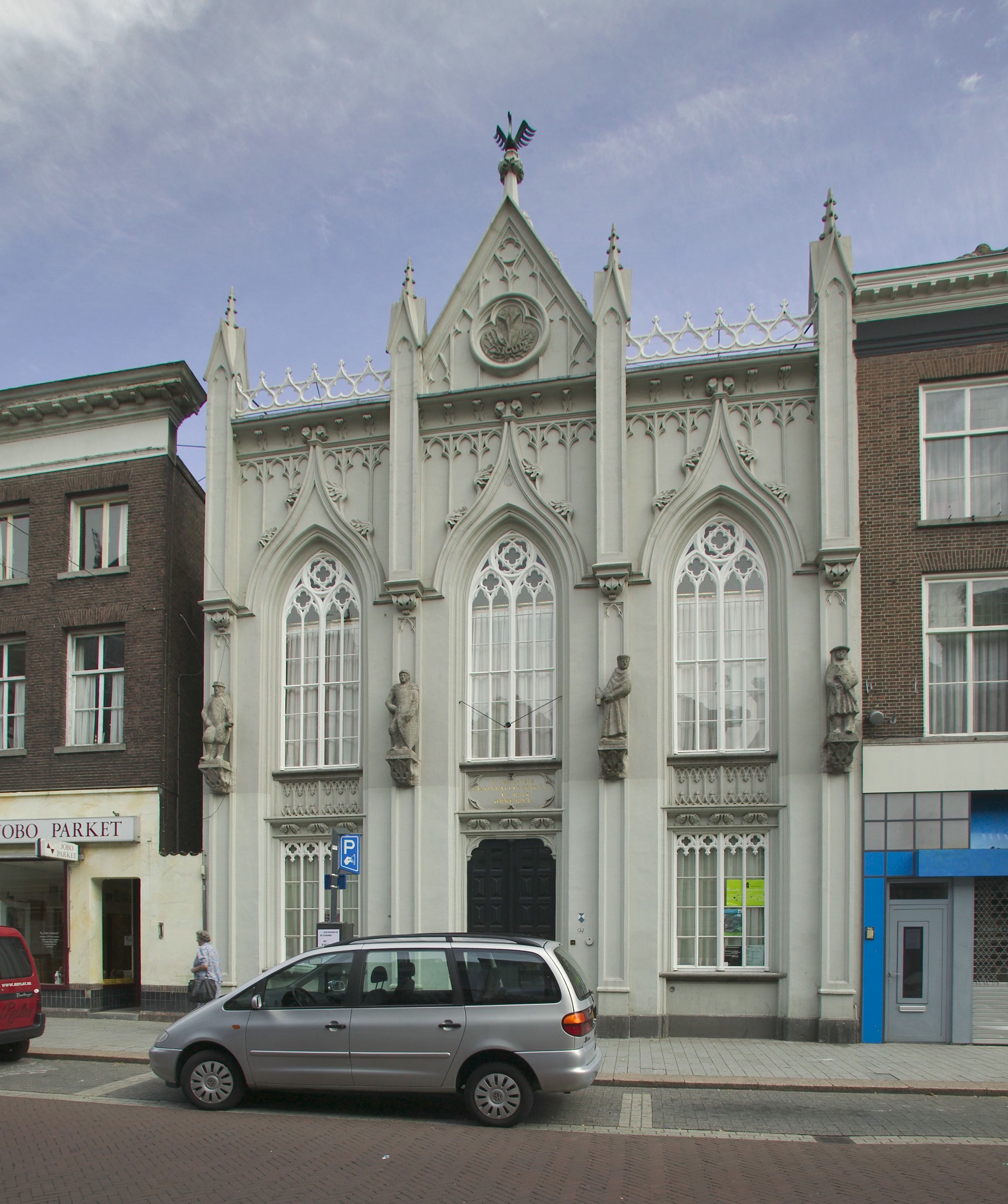 Zwanenbroedershuis: Overzicht van de voorgevel (opmerking: Gepubliceerd in ANWB Monumentenboek Nederland, 2003)